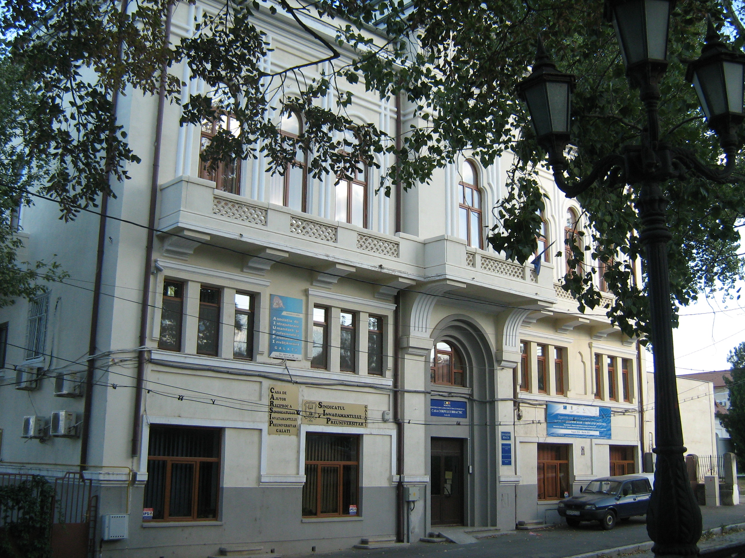 Galati - Casa Corpului Didactic